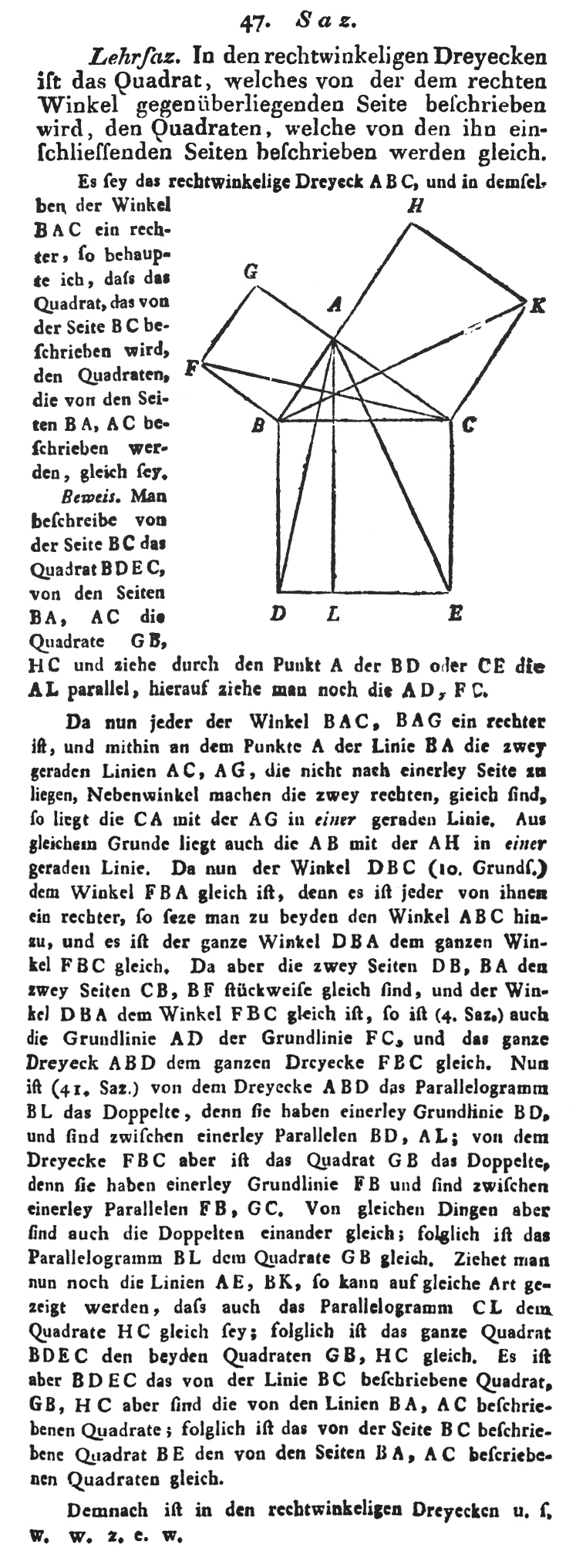 Satz 47 (Satz des Pythagoras) einschließlich des Beweises